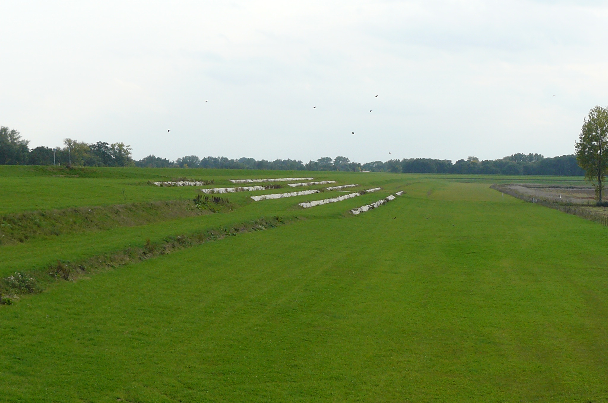 De Wakkere Dijk is een multifunctionele rivierdijk. Het beschermt de Bommelerwaard tegen rivierwater, maar het biedt ook mogelijkheden voor recreatie. De dijk is breder en hoger, en op bepaalde plekken tribunevormig aangelegd. Het is ook een vluchtplaats voor de grazers in het gebied bij hoogwater.